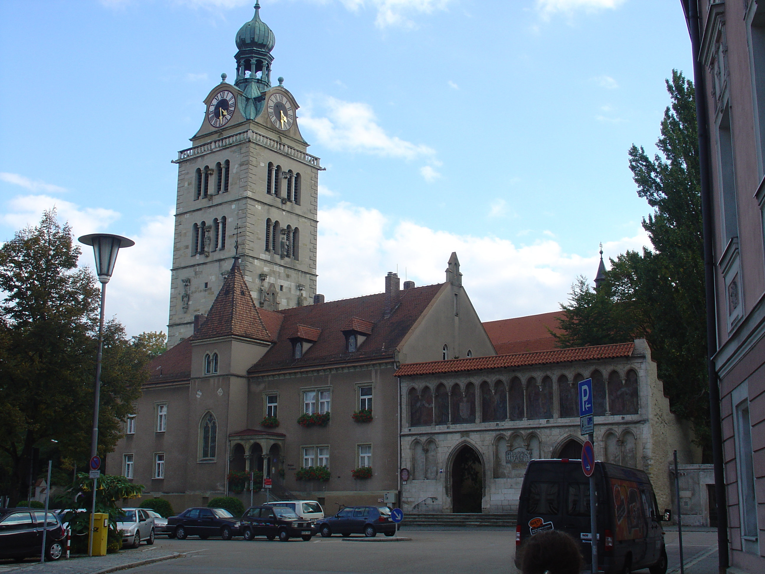 St.Emmeram in Regensburg